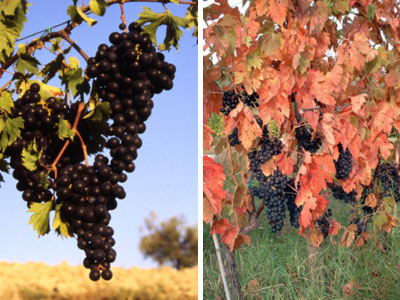 Vitigno Lacrima (Foto da: Comune di Morro d'Alba, AN)